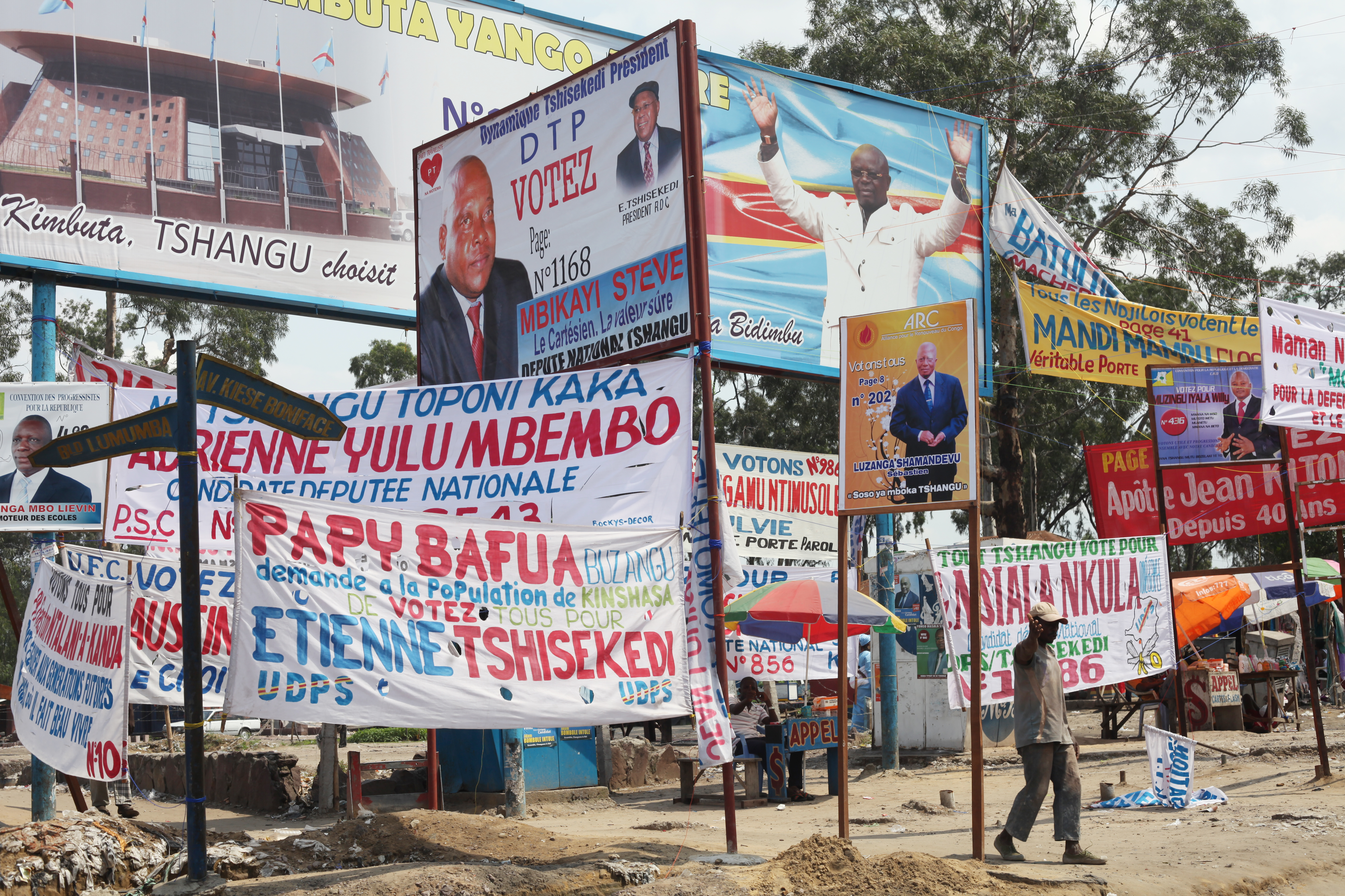 2011-11-10-Kindu-Electoral campaign Ndjili